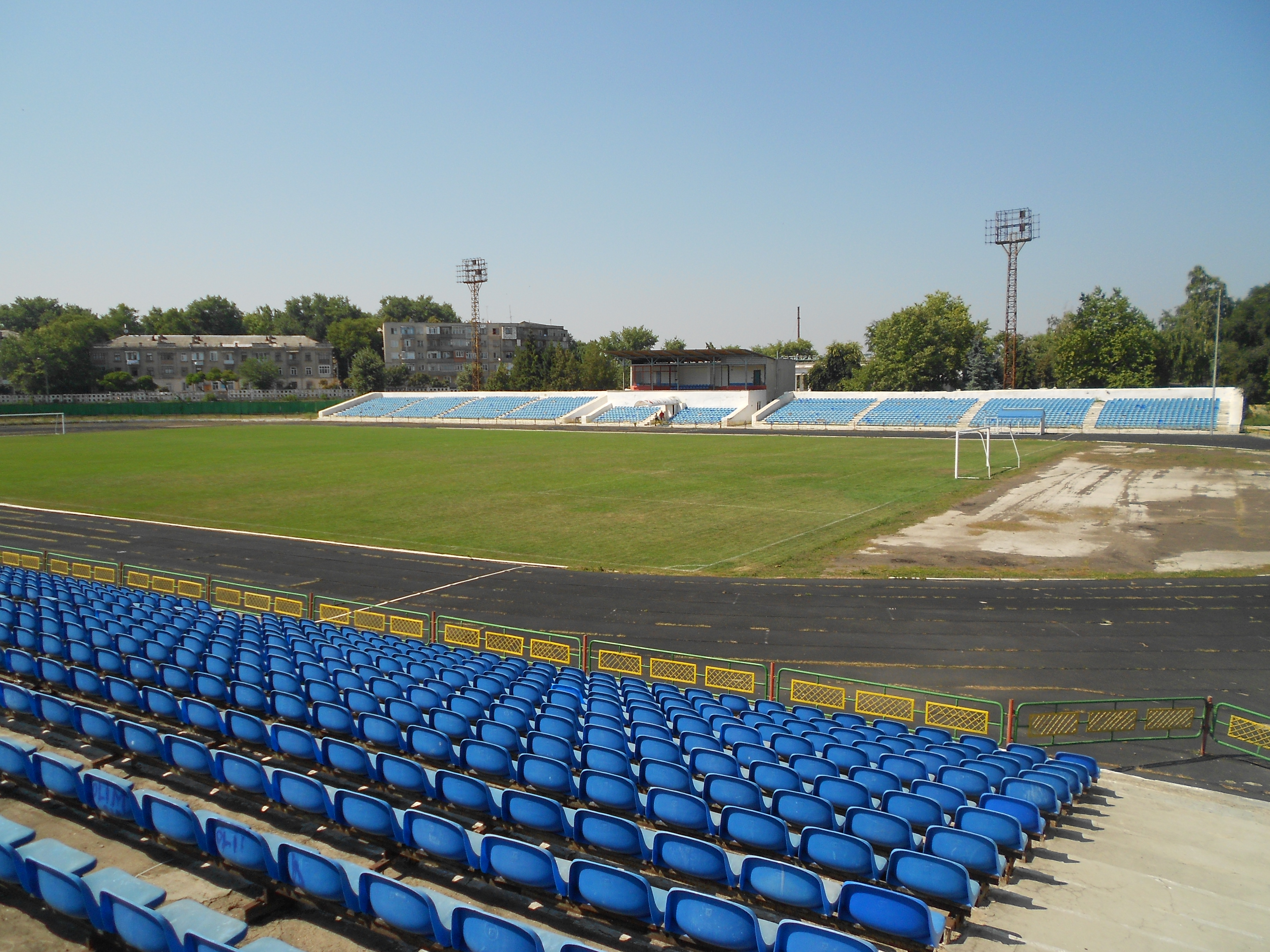 Stadionul Olimpia din Bălți